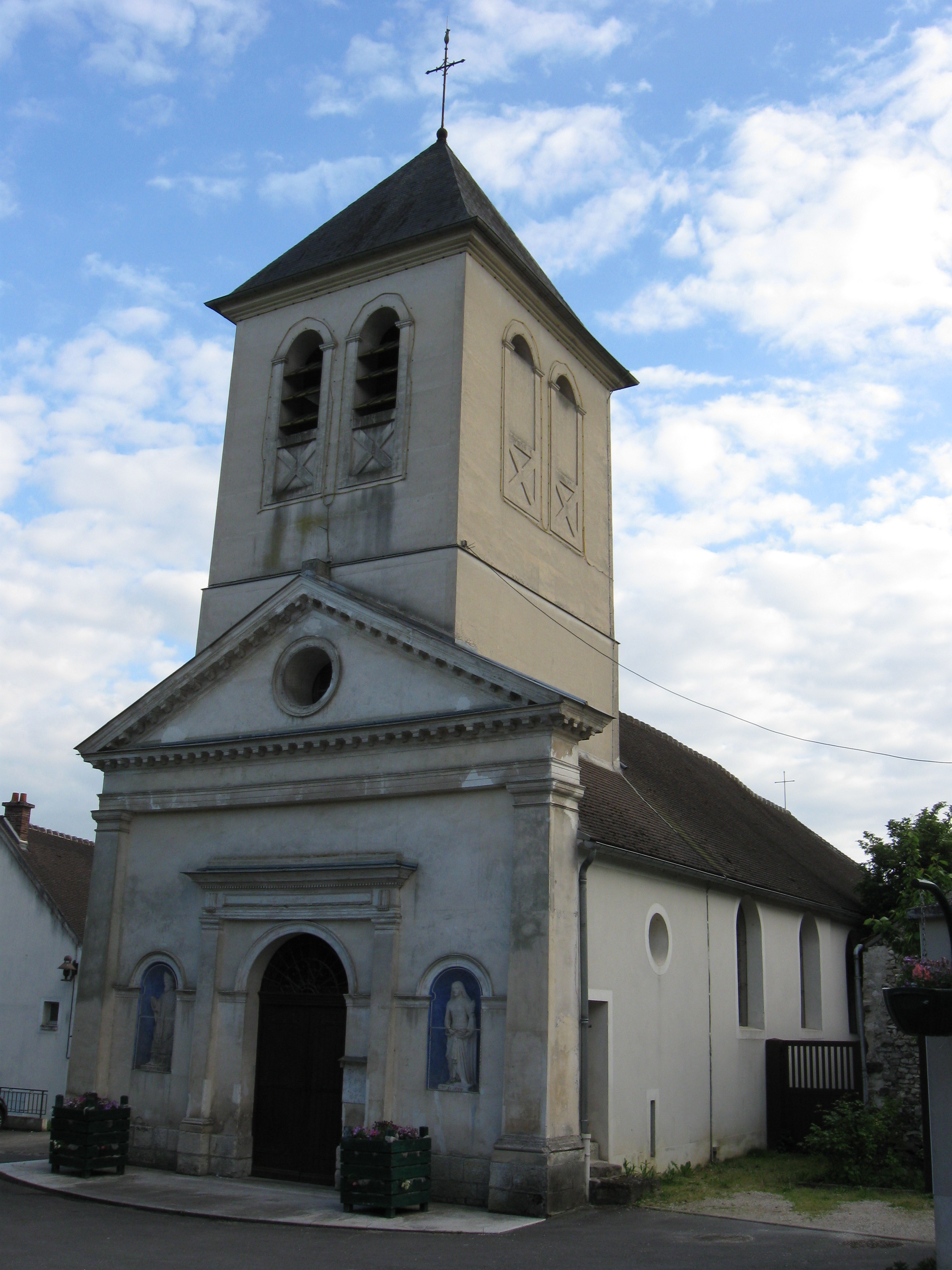 Église Saint-Germain de Mary-sur-Marne. (département de la Seine-et-Marne, région Île-de-France).